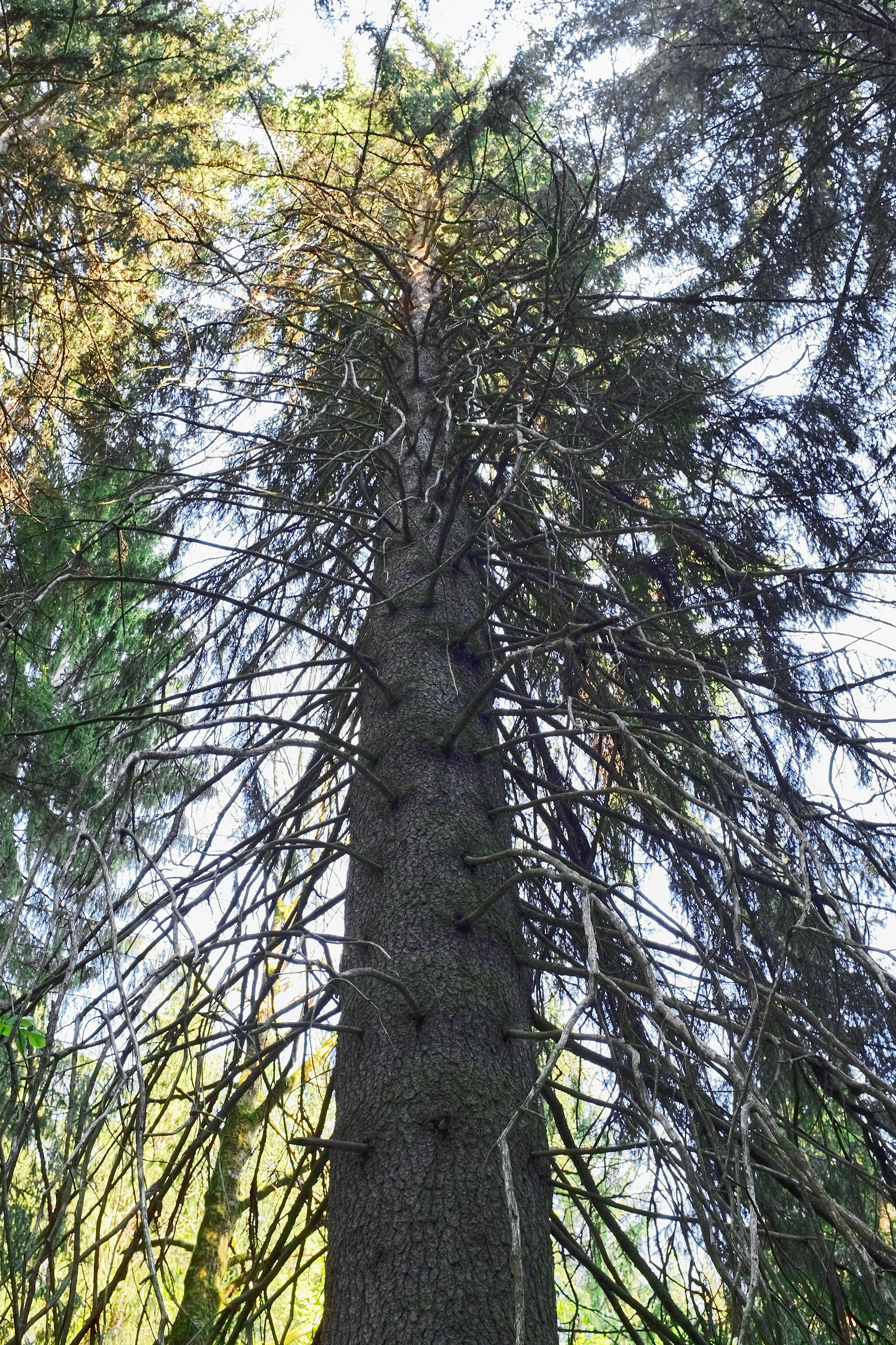 Památný strom - Vysoký smrk v Nancy - Nancy, zaniklá osada obce Stříbrná, okres Sokolov